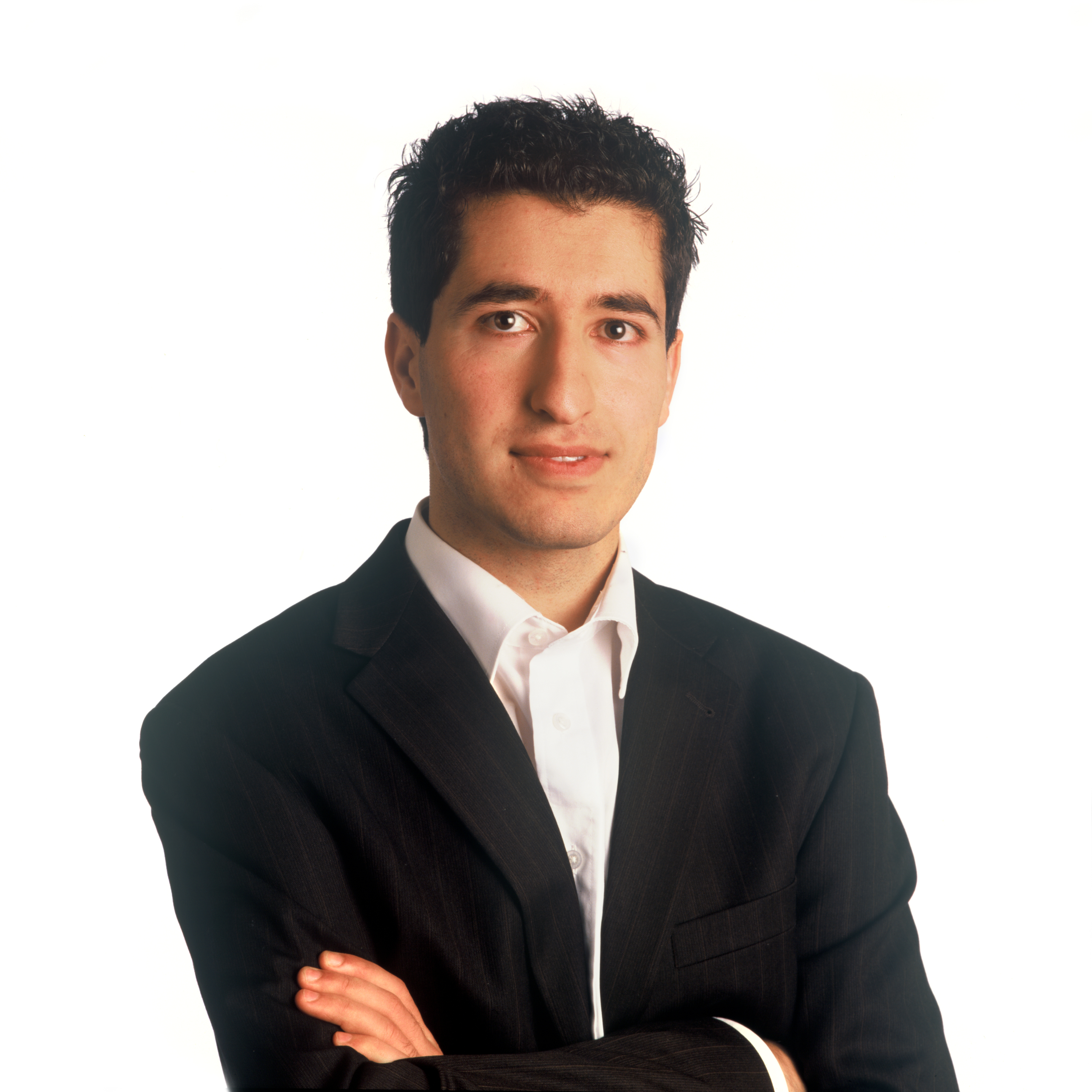 Farshad Bashir